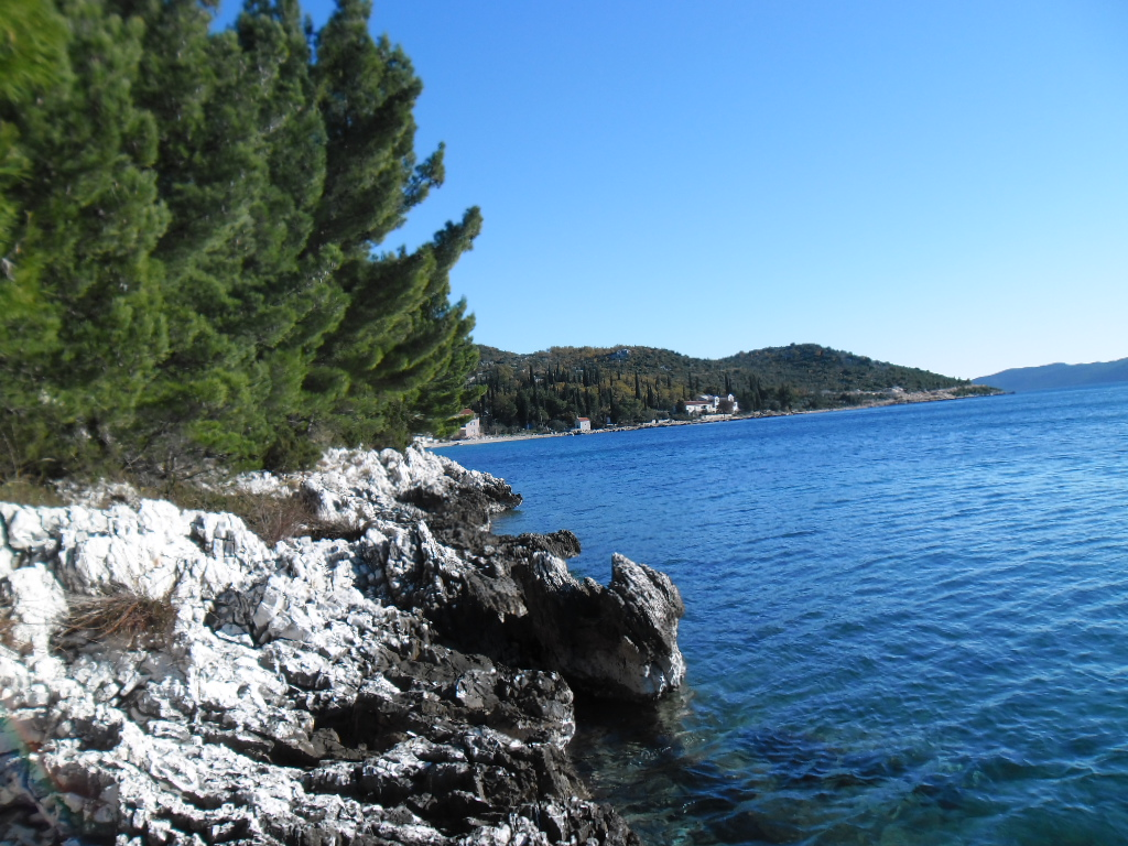 obala Dubrovačkog primorja